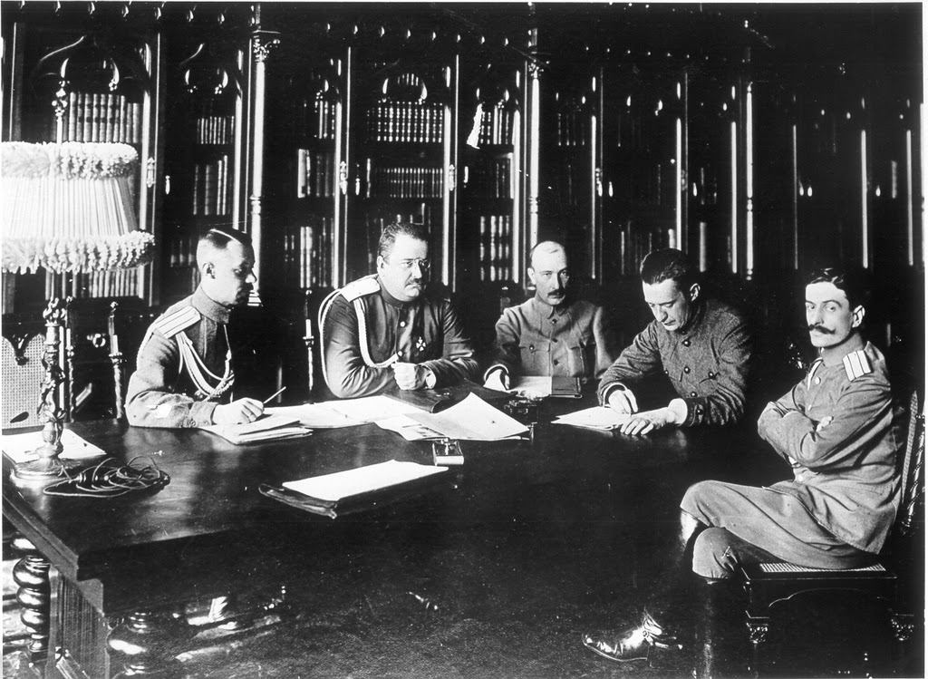 Заседание военного министерства Временного правительства 4 состава (слева направо): г.ш.полковник Барановский, г.ш.генерал-майор Якубович, Б.В.Савинков, А.Ф.Керенский и г.ш.полковник Туманов.